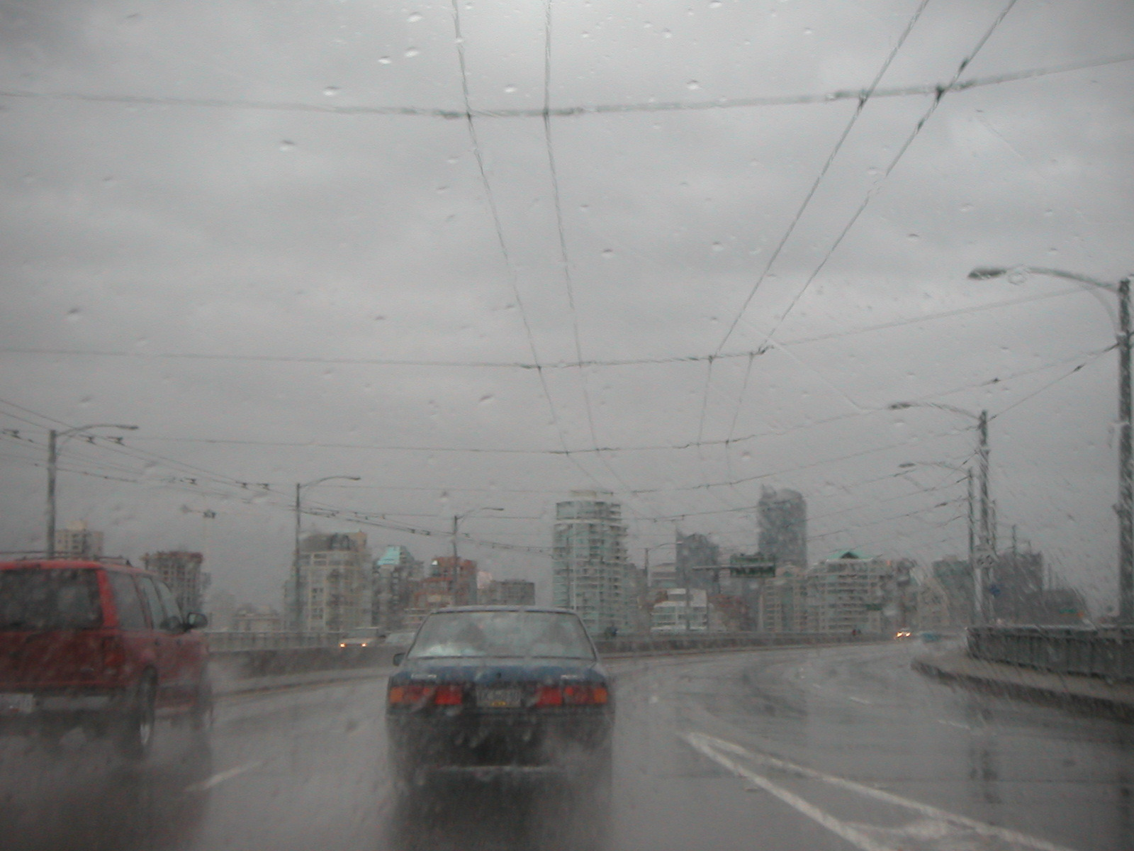 Vancouver BC